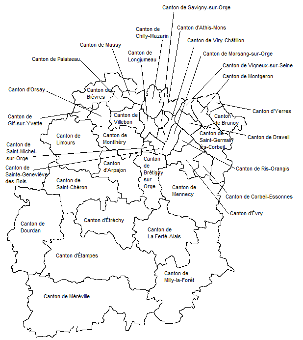 Carte des cantons de l'Essonne (91) en 1975.